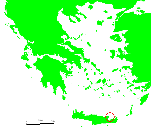 GR Spinalonga.PNG (Greek island)